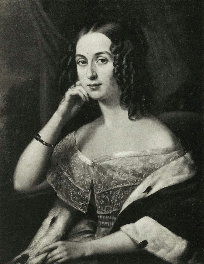 Елизавета Андреевна Ушакова, ур. Стороженко (1818—1897)